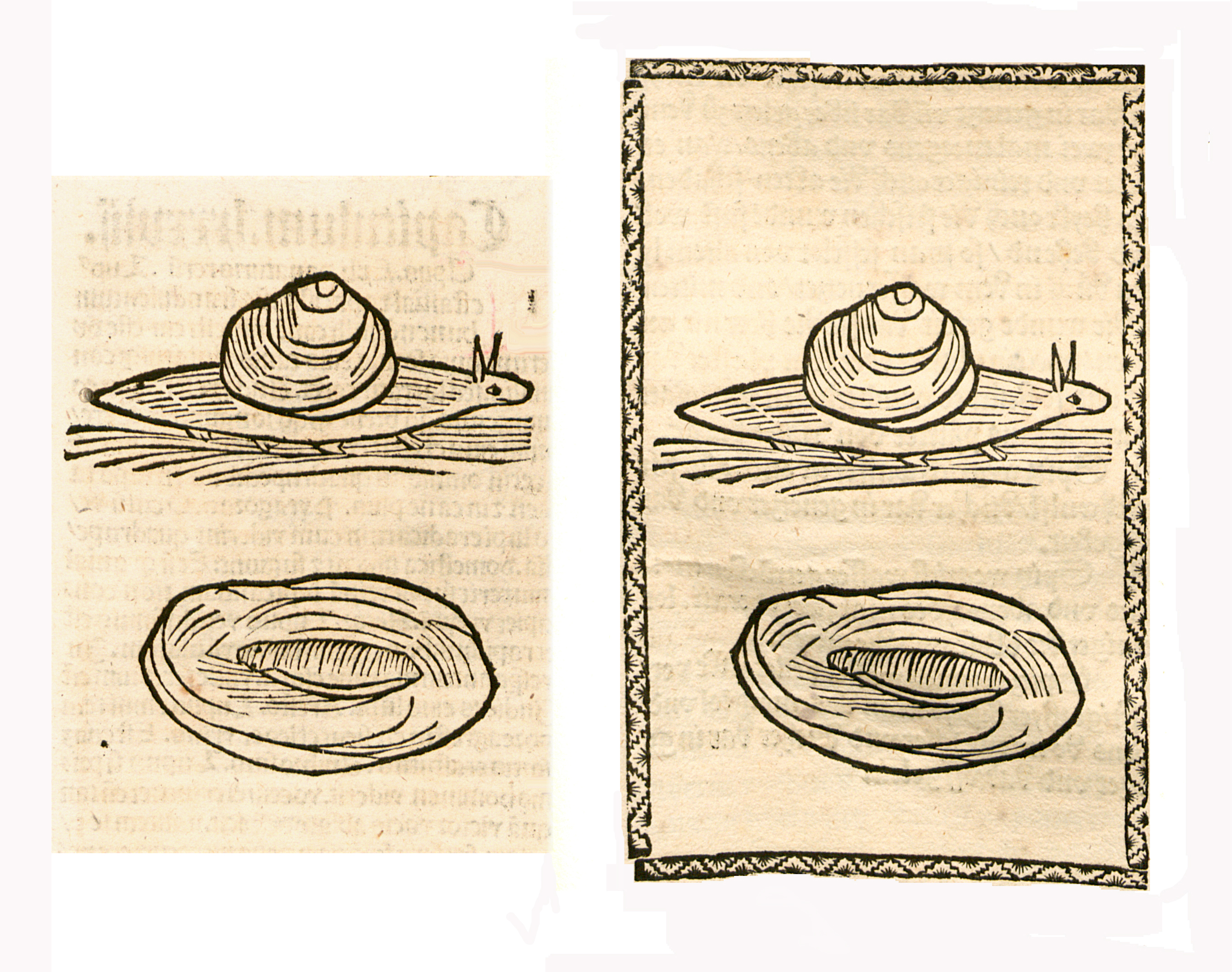 Abbildung vonː Schnecken